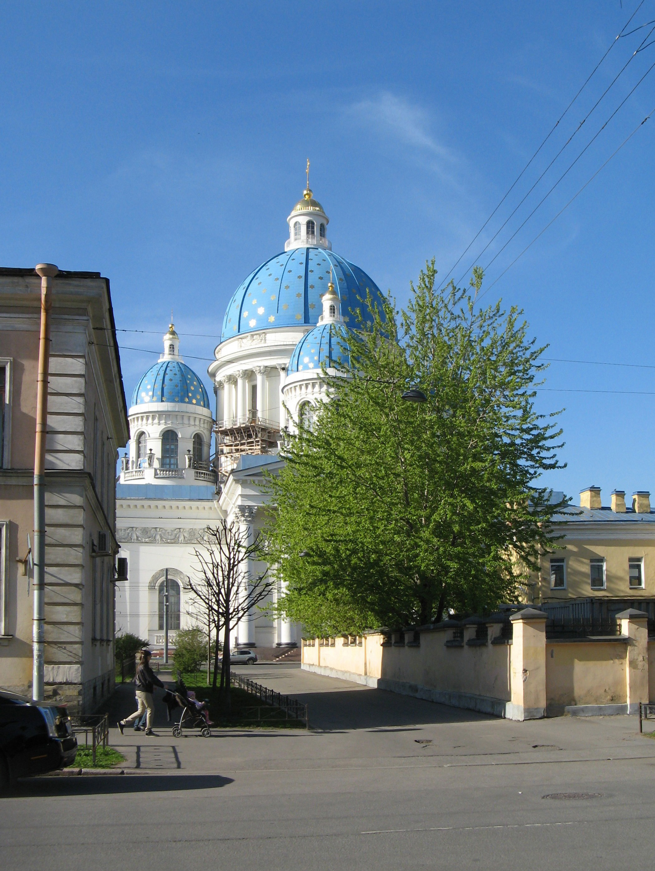 Собор Троицкий (Измайловский): Измайловский проспект, 4-а, 7-а, Адмиралтейский район, Санкт-Петербург